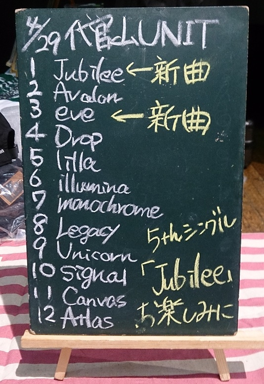 amiinAセトリボード(20180429(1))